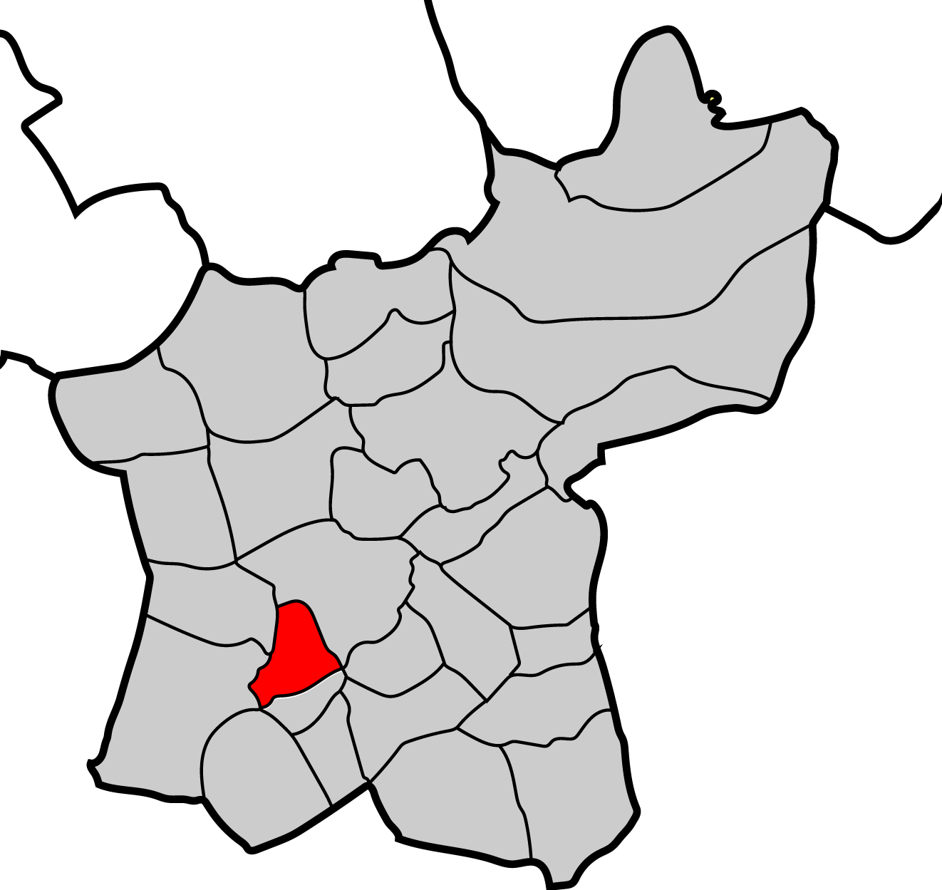 Mapa parroquia de Riba de Neira Baralla